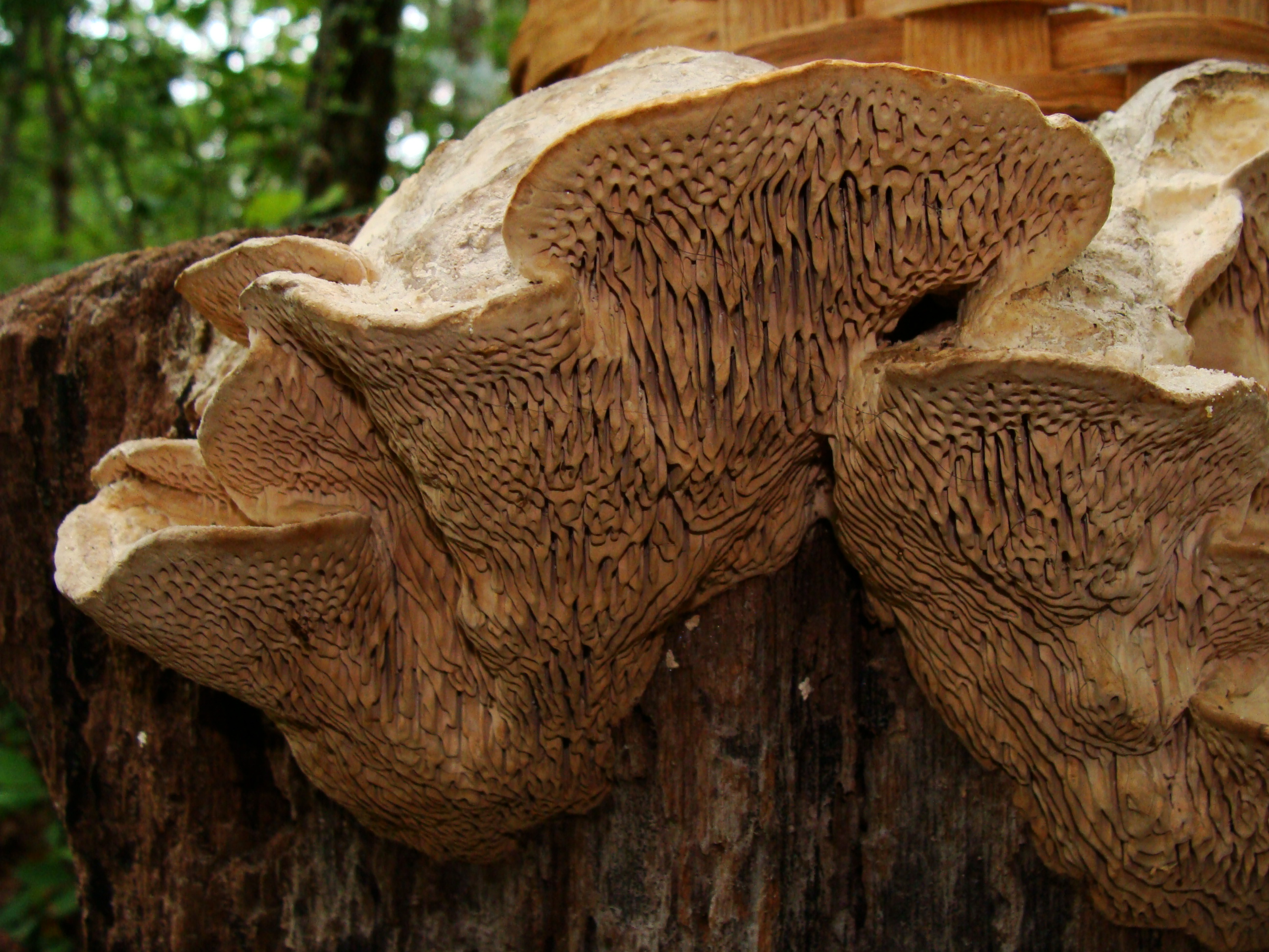 Daedalea quercina (L.) Pers.